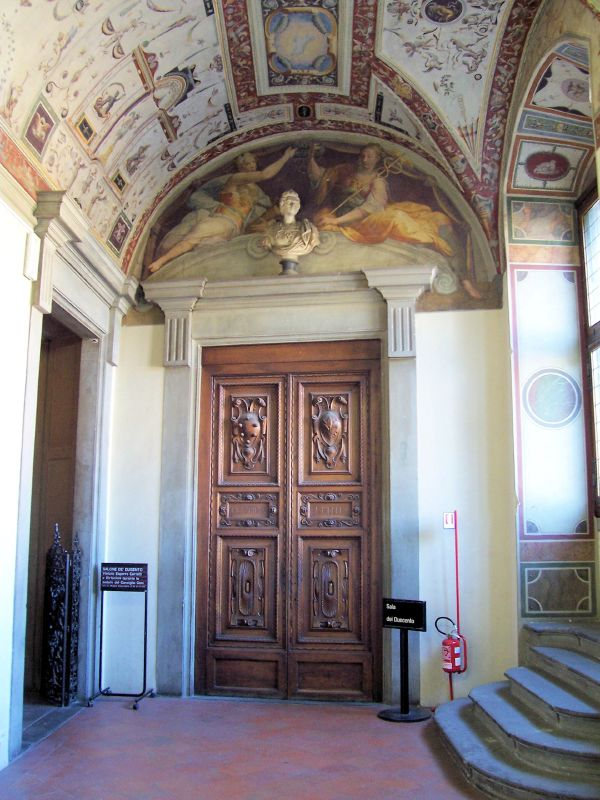 Palazzo Vecchio, Firenze, Italia